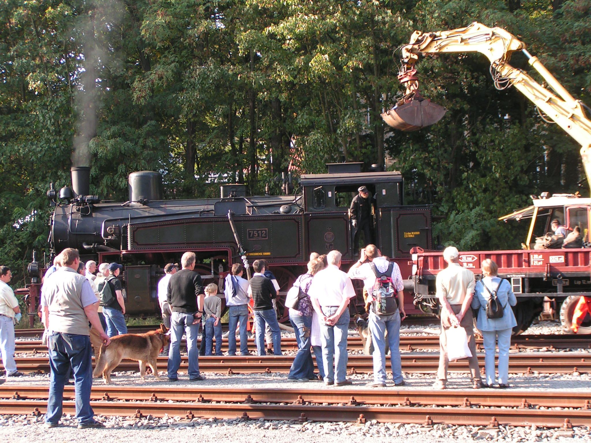 Bahnhofsfest auf dem Zechenbahnhof Piesberg (Osnabrück)